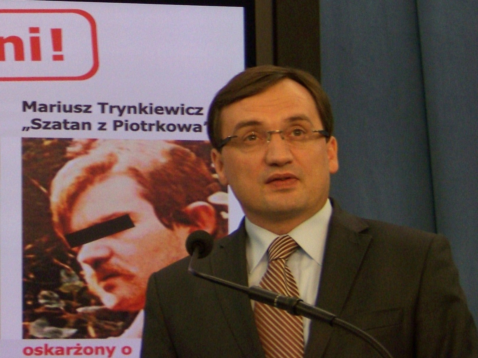 Konferencja prasowa: Mariusz Trynkiewicz (na ekranie) i Zbigniew Ziobro.